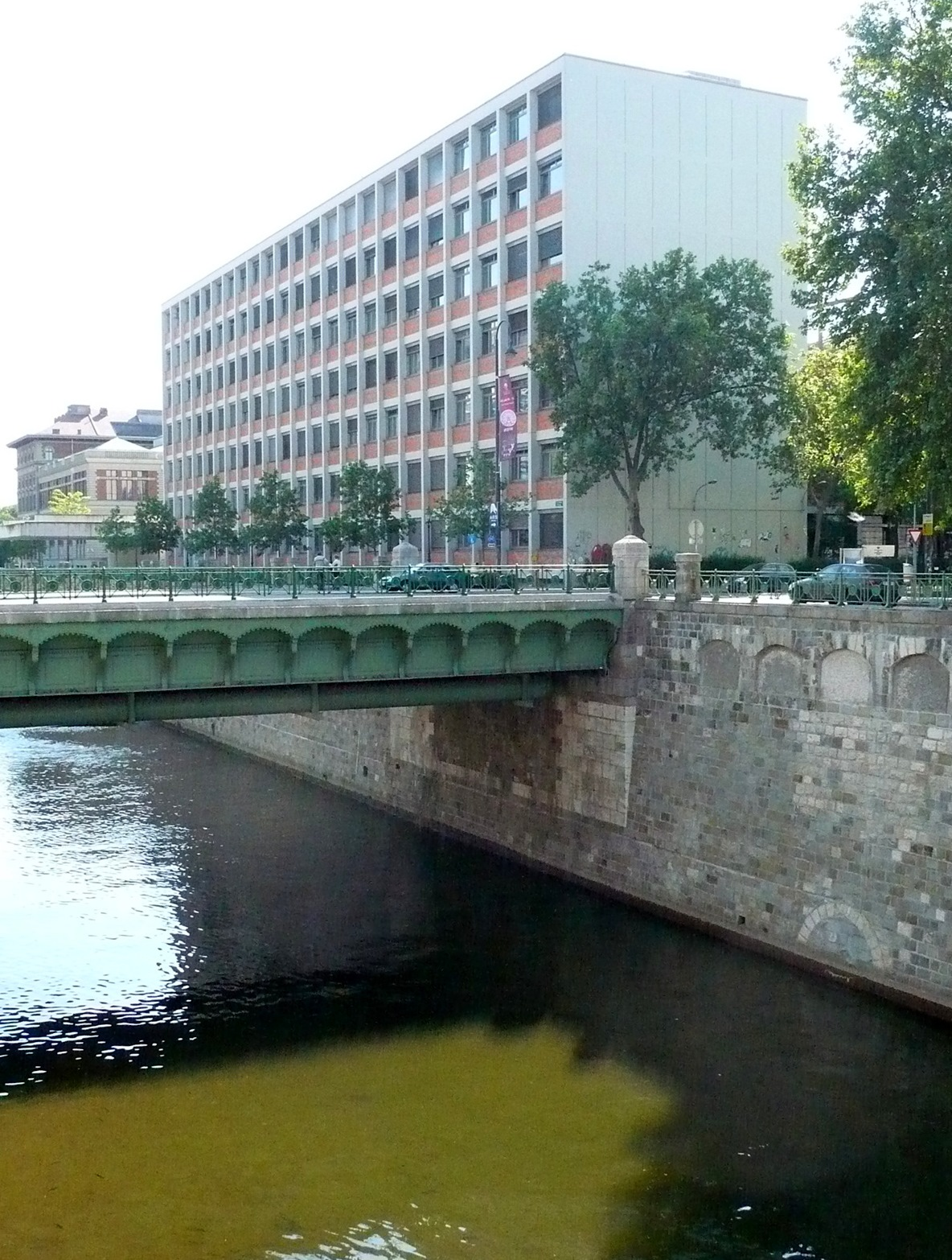 Wientalverbauung, Kleine Marxerbrücke